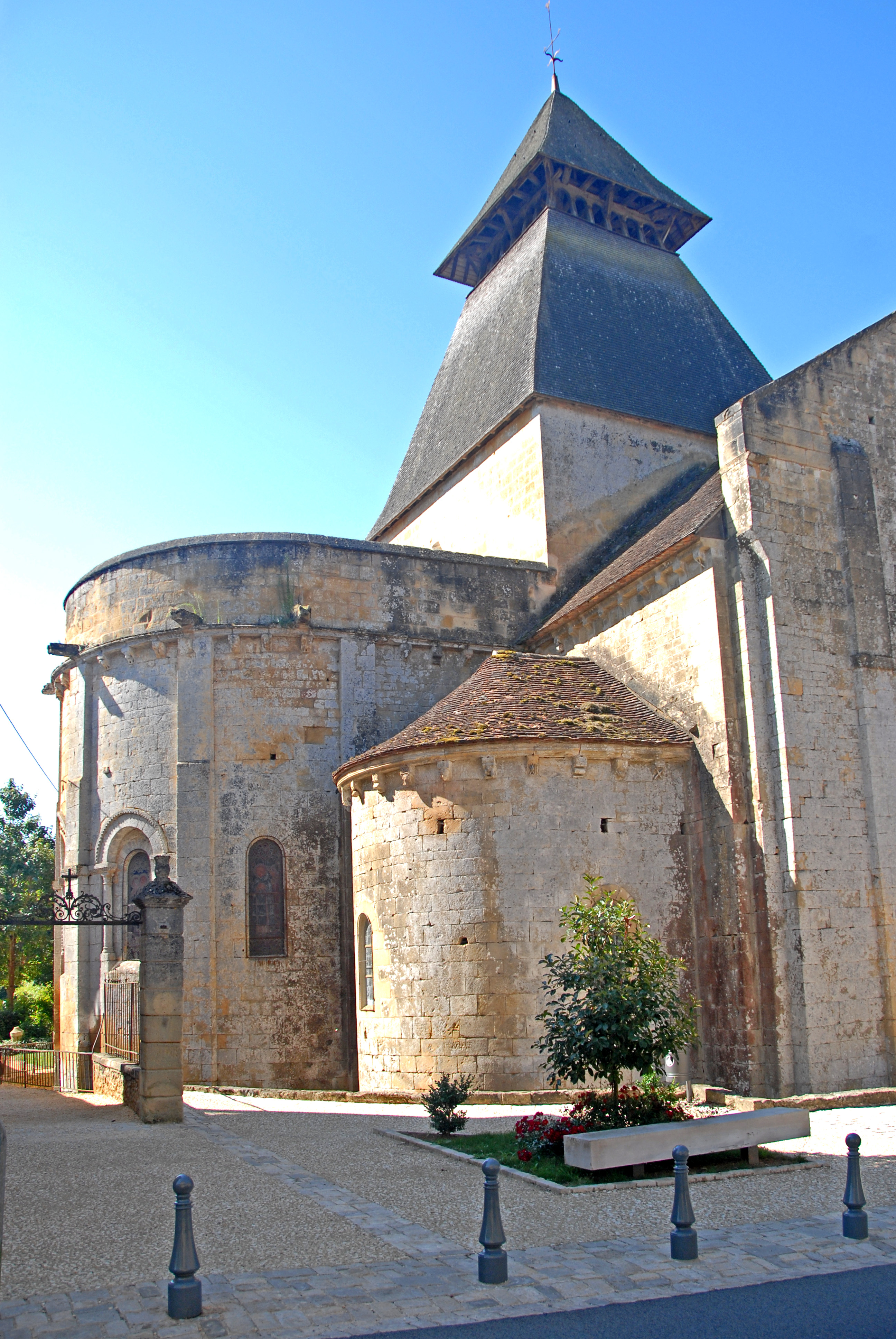 Cadouin, Abteikirche, Chorhaupt